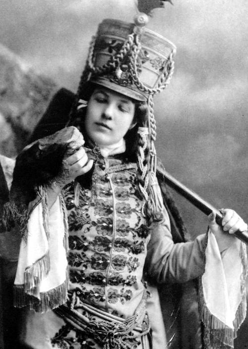 Fedák Sári magyar színésznő